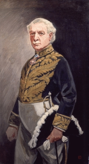 David Lloyd George